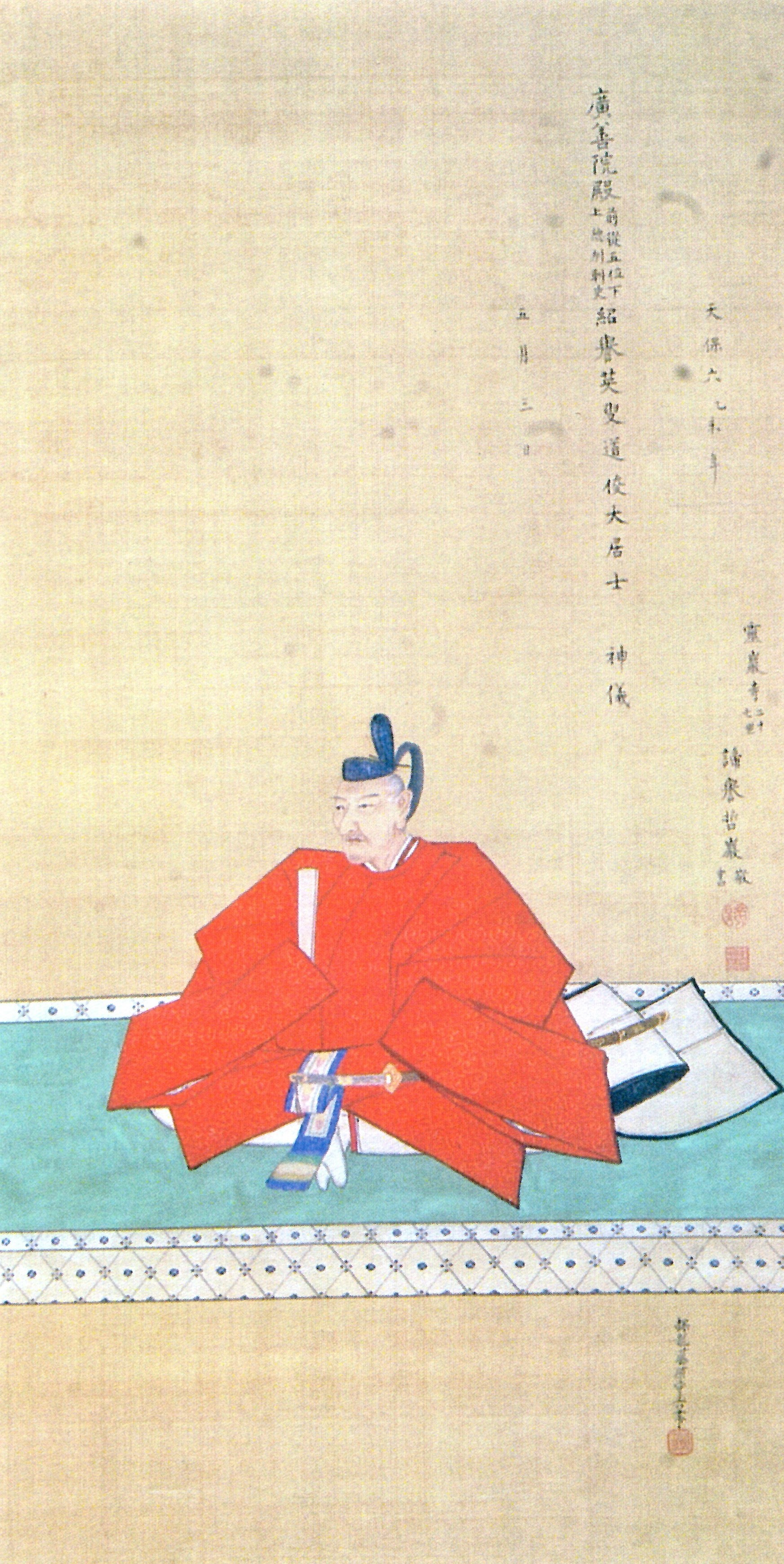 京極高備の肖像。